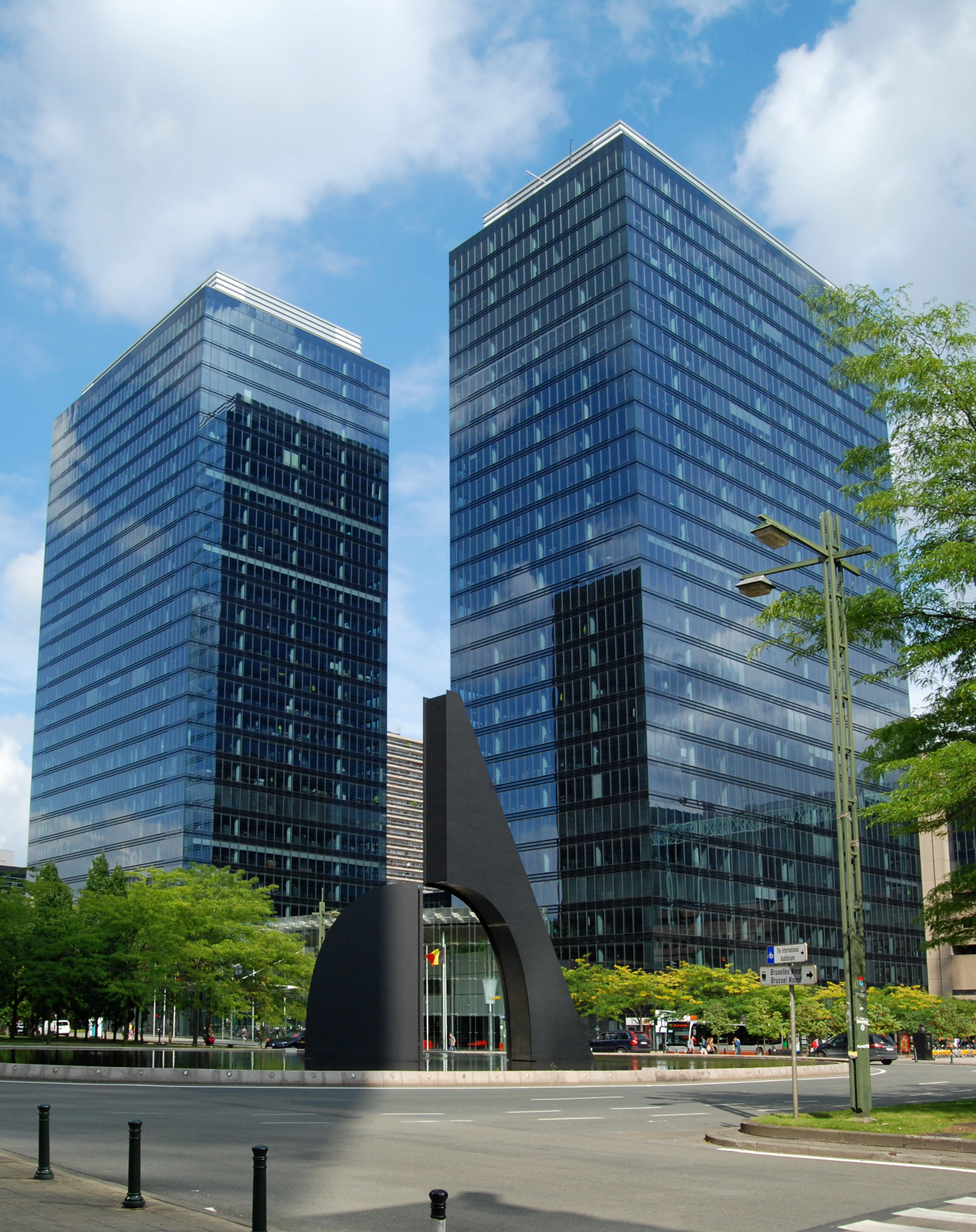 Belgique - Bruxelles - North Galaxy Towers (architecture postmoderne - Bureau d'architecture Henri Montois, Jaspers et Art & Build - 2004)